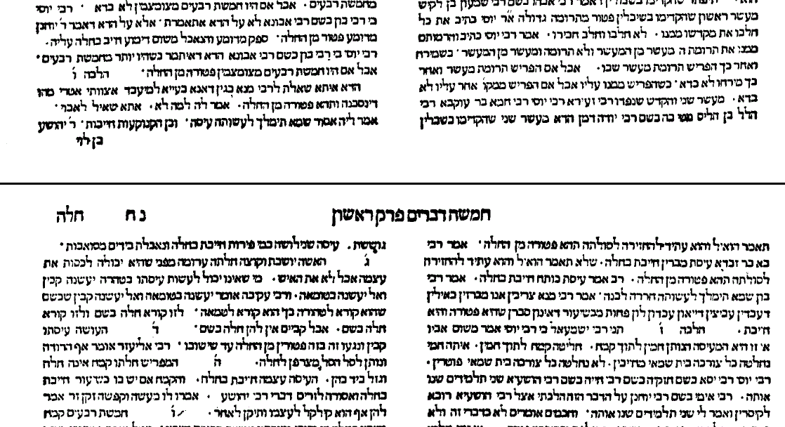 סוף דף נ"ז ותחילת דף נ"ח ממסכת חלה בדפוס ונציה של התלמוד הירושלמי. לפי שומר הדף ולפי השוואה לכתב יד ליידן, שורה אחת הושמטה.